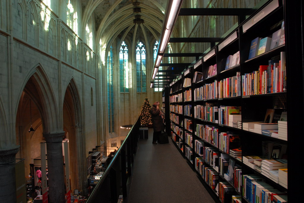 Dominikanerkerkstraat Maastricht Boekhandel ?Selexyz Dominicanen? is sinds het najaar van 2006 gevestigd in de eeuwenoude Dominicanenkerk te Maastricht. Deze kerk verloor tweehonderd jaar geleden haar sacrale functie en deed sindsdien vele jaren dienst als ondermeer slangenhuis, fietsenstalling en carnavalstempel. Op het voormalige priesterkoor van de Dominicanenkerk kun je terecht voor een cappuccino of een lunch. Dit priesterkoor doet ook dienst als cultureel podium. Er vinden regelmatig lezingen en debatten plaats en er is ruimte voor expositie. Since autumn 2006 is bookshop ?Selexy Dominicanen? domiciled in the centuries-old Dominican church. Two hundred years ago the church lost her sacral function and was in use as a bicycle shed, a snake house and a carnival temple. On the former choir you can have lunch or just a drink. The choir is also used as a cultural podium. There are often exhibitions, lectures and debates.